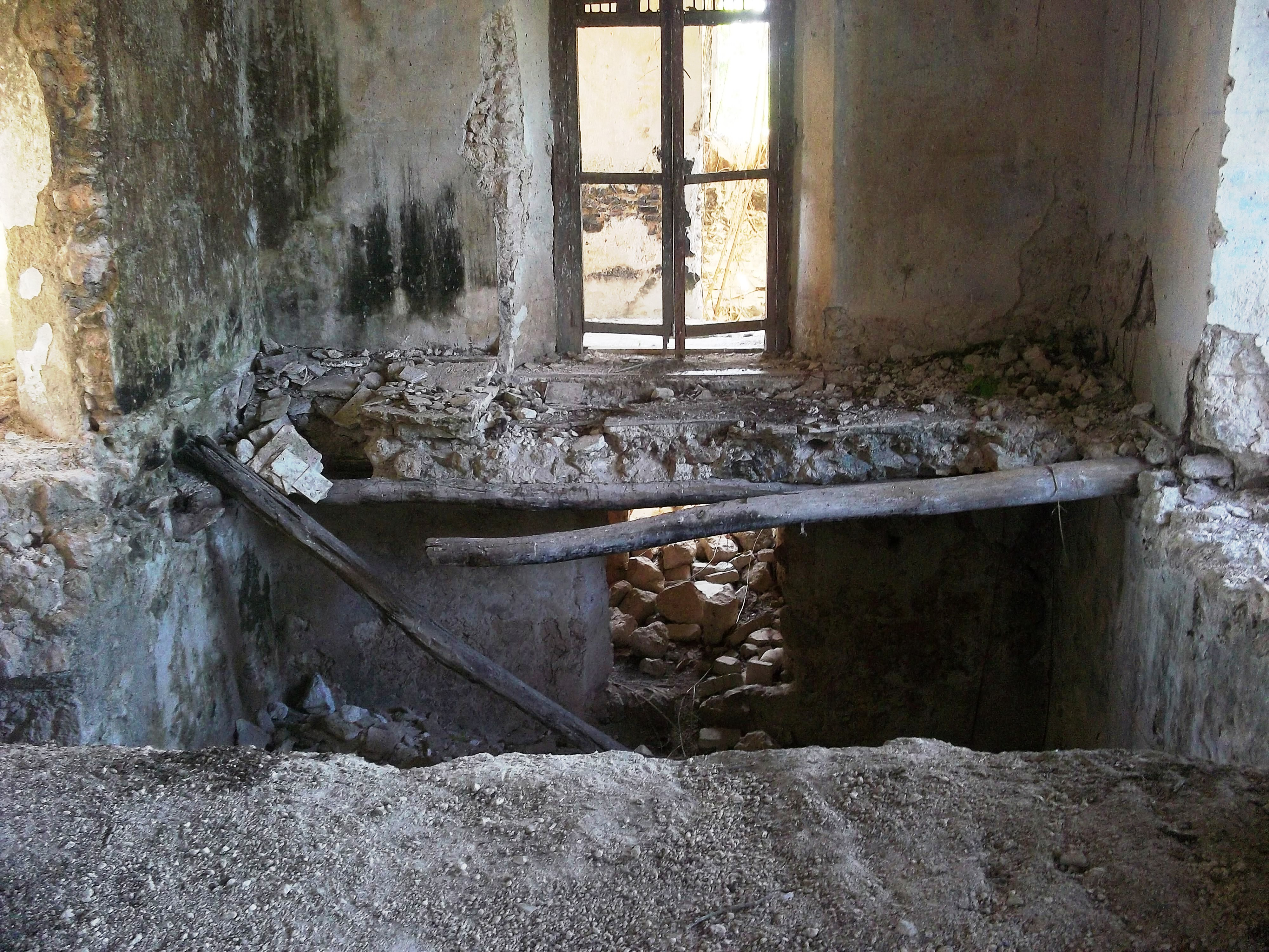 Hacienda de San Antonio Tzacalá, Yucatán.